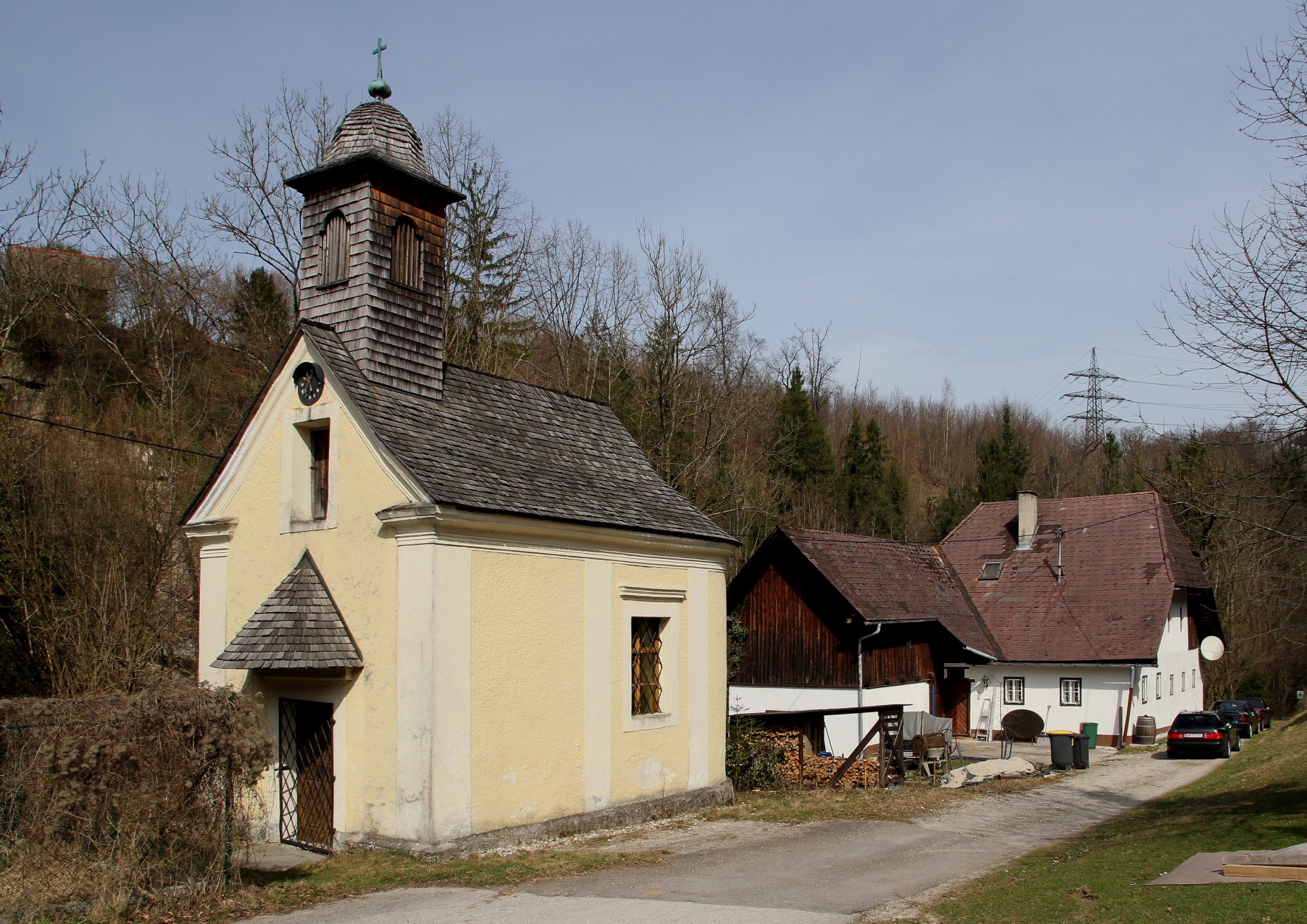 Die Traunfallkapelle hl. Nikolaus aus dem Ende des 17. Jahrhunderts.